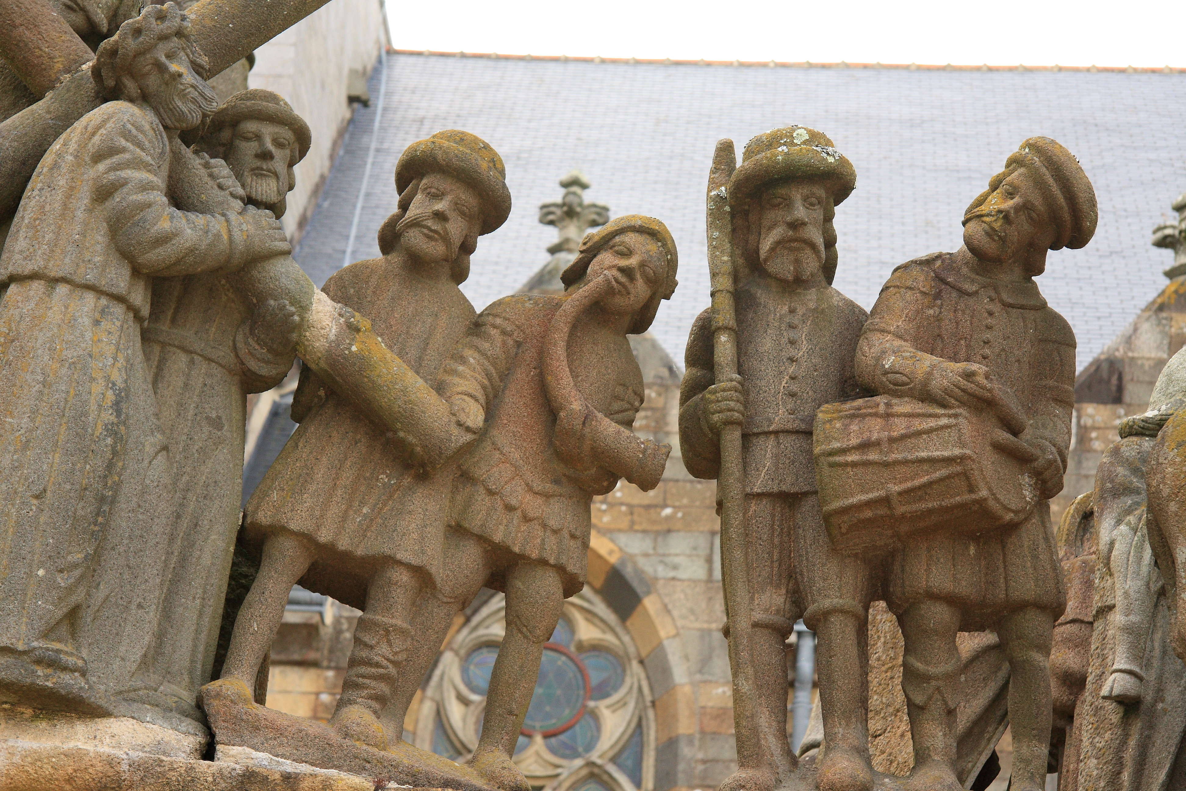 détails du calvaire de Plougastel